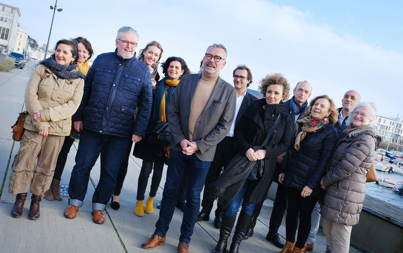 Campagne municipale de Brest